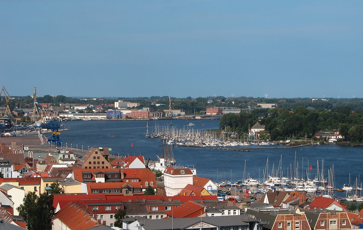 Beschreibung: Stadthafen (Sicht von St. Petri) / Rostock / Germany Fotograf: Darkone, 31. August 2005